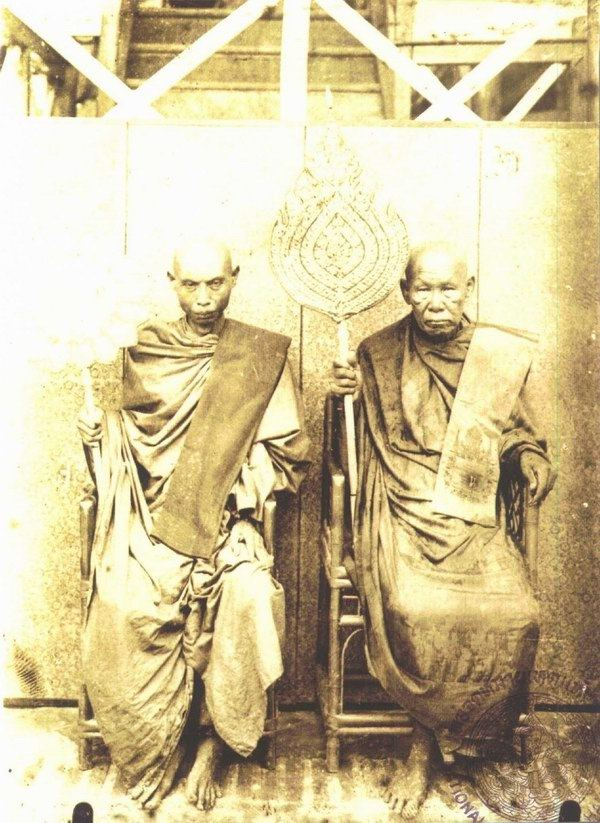 Luang Pho Chaem or Phra Khru Wisiddhi Vongsajarn of Wat Chalong and Luang Pho Khai of Wat Monkkhon Nimit, Buddhist monks in Phuket. พระครูวิสิทธิวงศาจารย์ (หลวงพ่อแช่ม) วัดฉลอง และ หลวงพ่อไข่ วัดมงคลนิมิตร